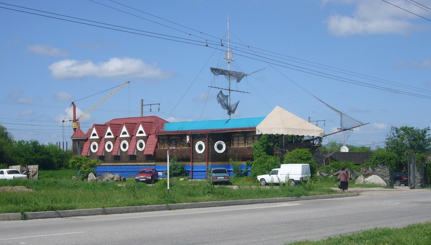 Корсар у села Адиюх